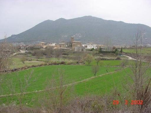 Vista General de Rasal